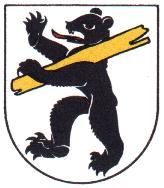 Wappen Gemeinde Herisau